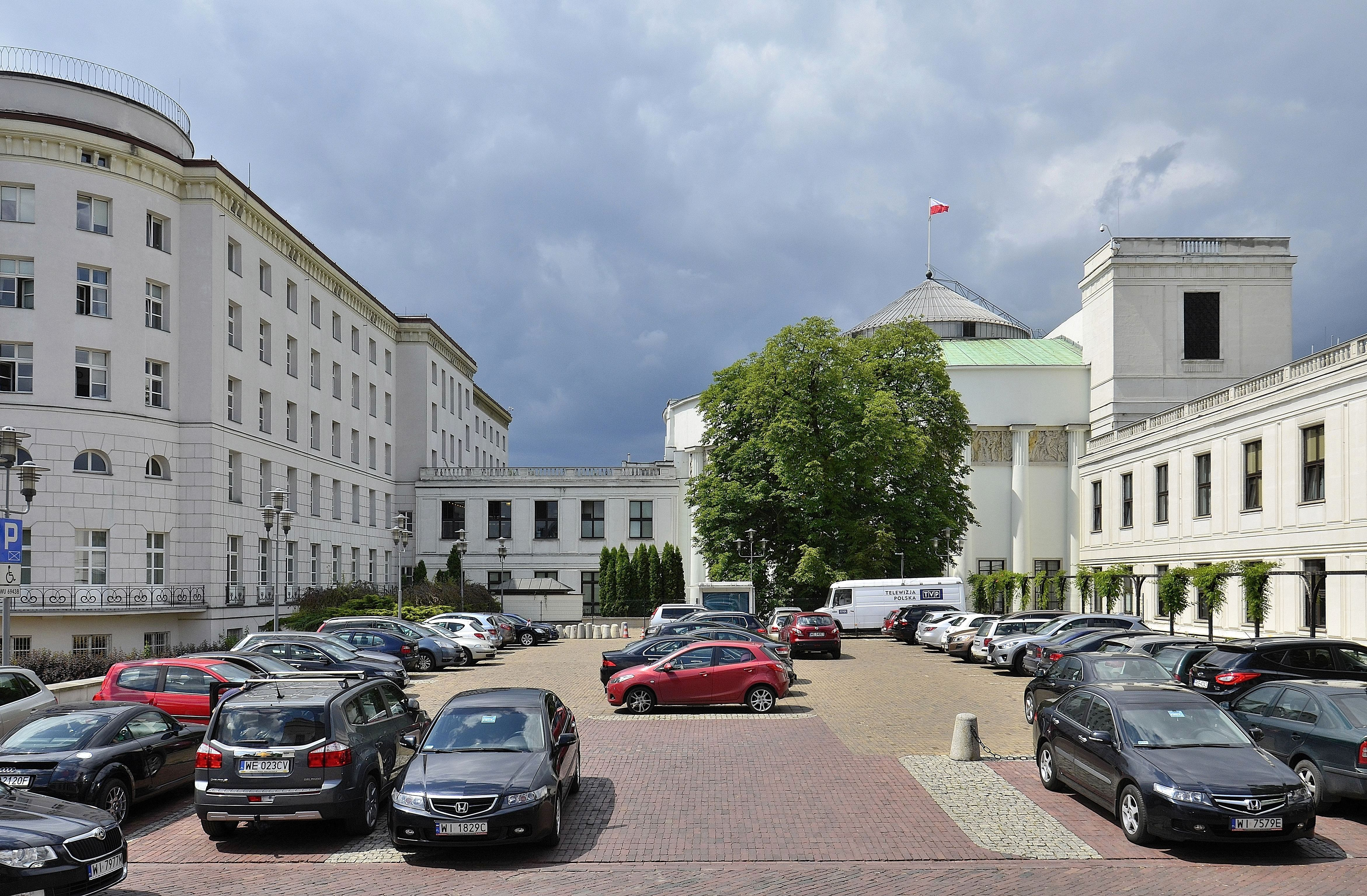 Gmach Sejmu od strony ul. Piotra Maszyńskiego